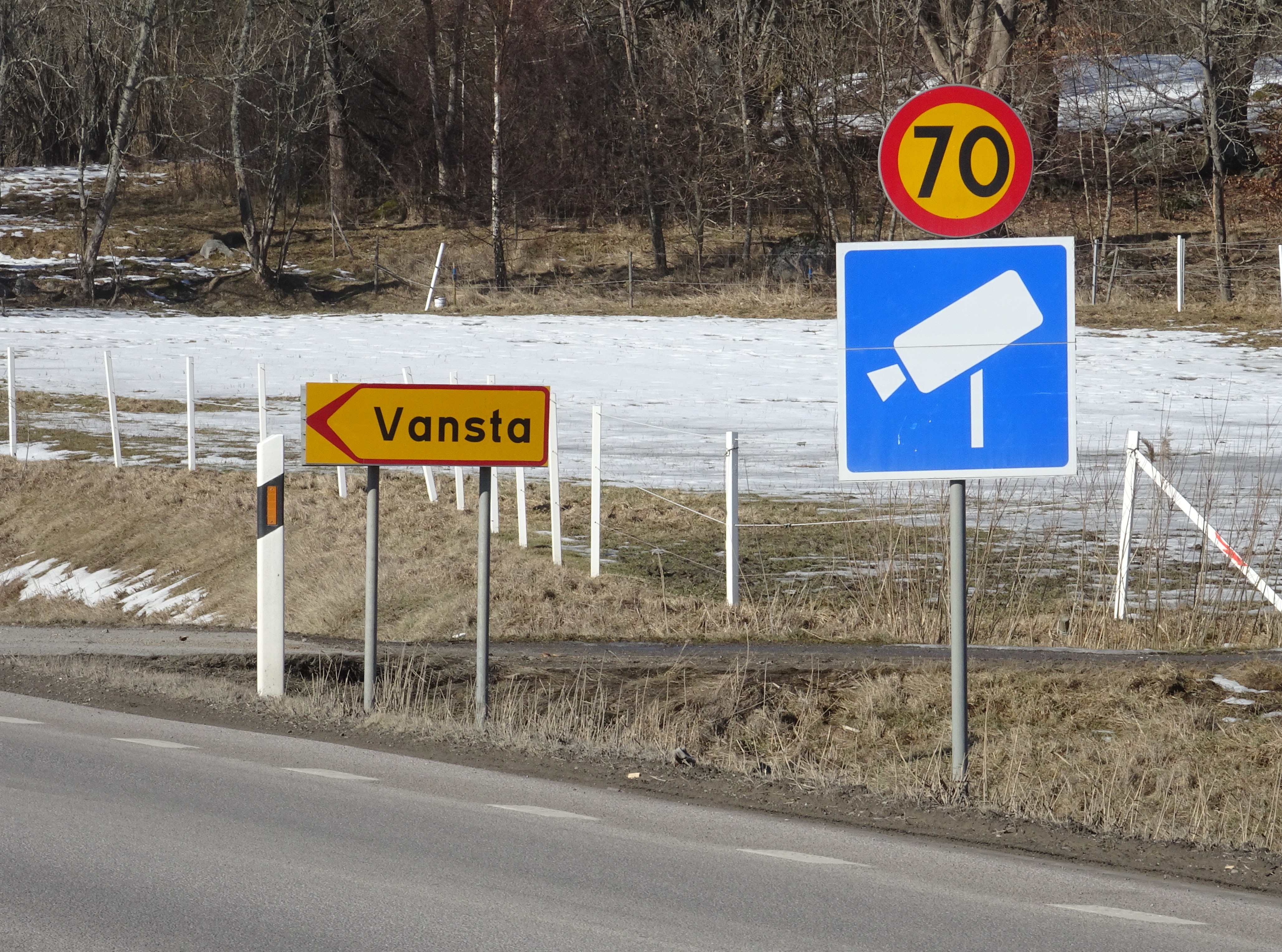 Vansta gård, Ösmo socken (vägskylt), Länsvägen 225